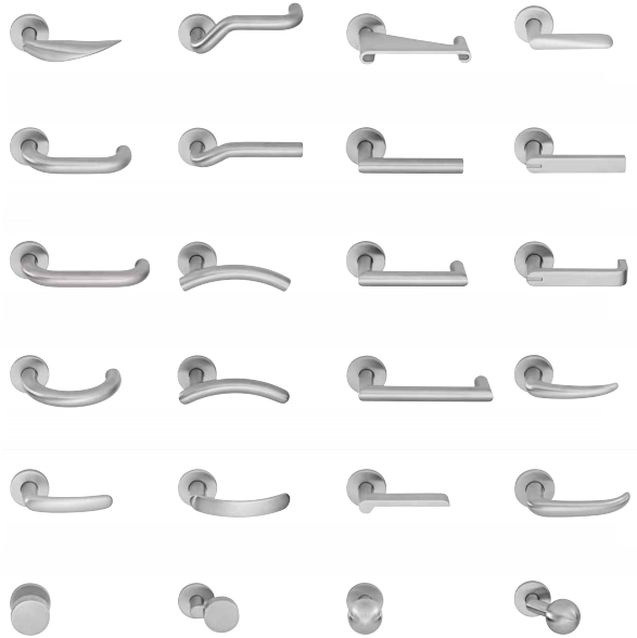 Двусторонняя нажимная дверная ручка